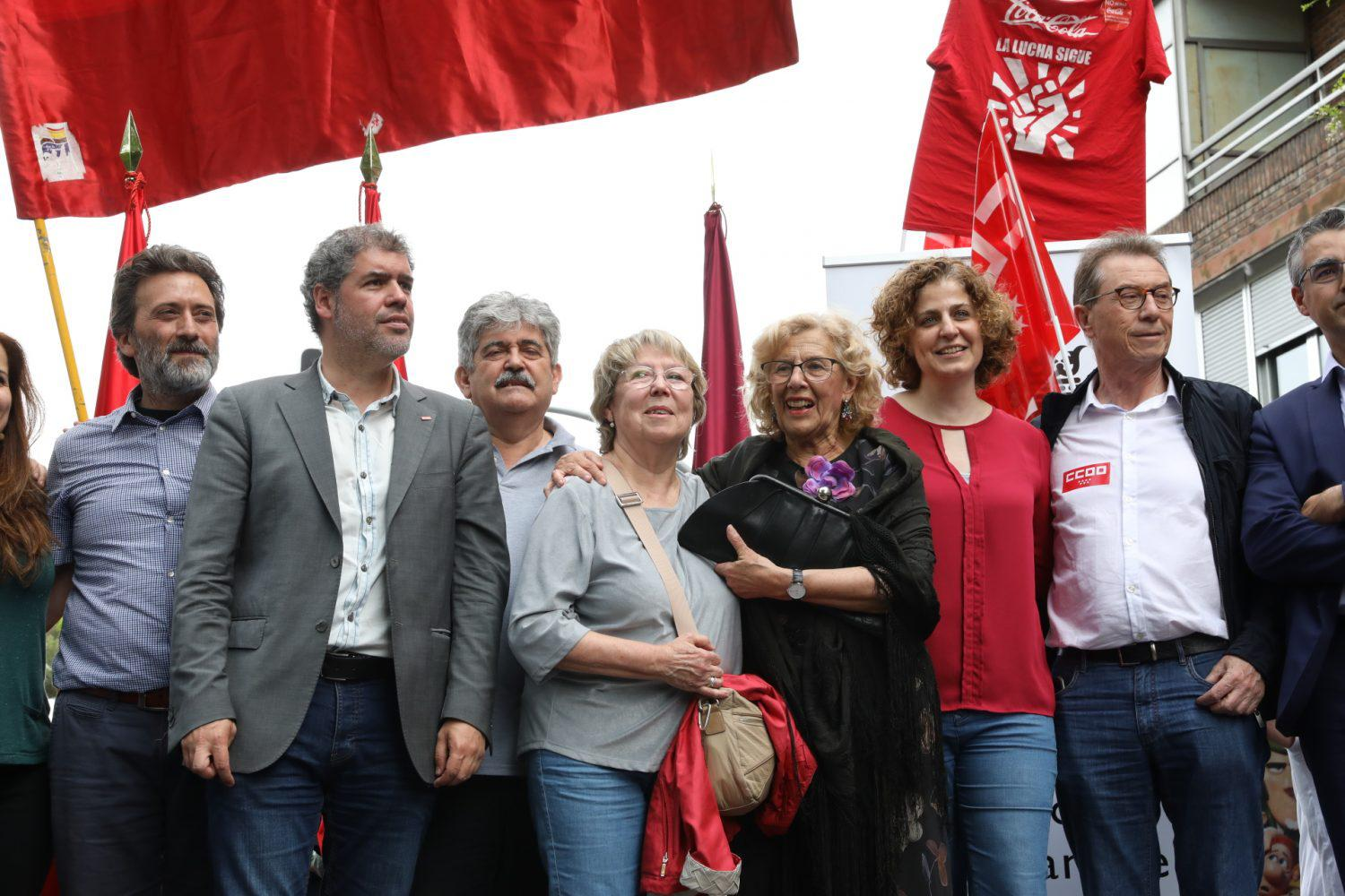 Marcelino Camacho ya tiene una calle con su nombre en Madrid. El paseo de Muñoz Grandes, una calle que él conocía bien por estar ubicada en Carabanchel, el distrito en el que residió durante casi toda su vida, pasa a llamarse desde hoy paseo de Marcelino Camacho. Esta tarde, la alcaldesa de Madrid, Manuel Carmena, ha asistido a la colocación de la placa con la nueva rotulación. El Ayuntamiento rinde así homenaje a quien fuera histórico dirigente de Comisiones Obreras y vecino de Carabanchel.